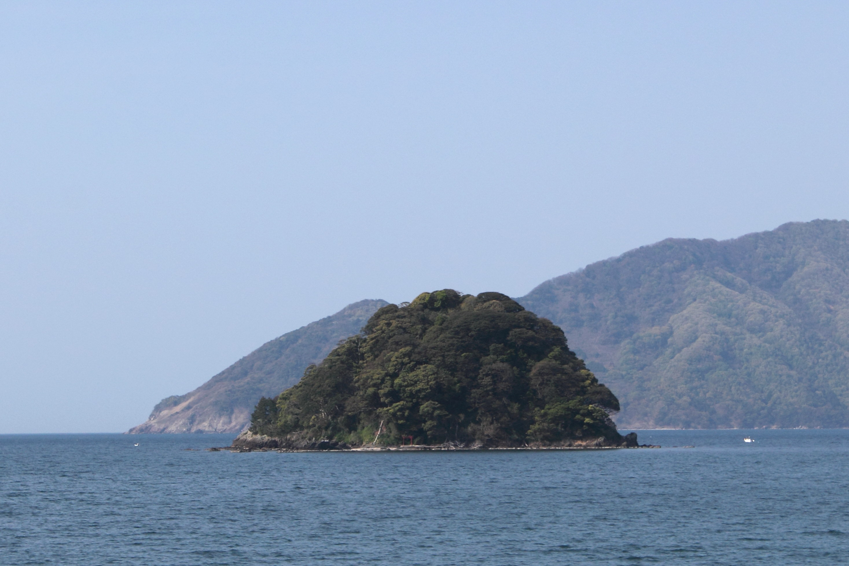 小浜湾内にある蒼島